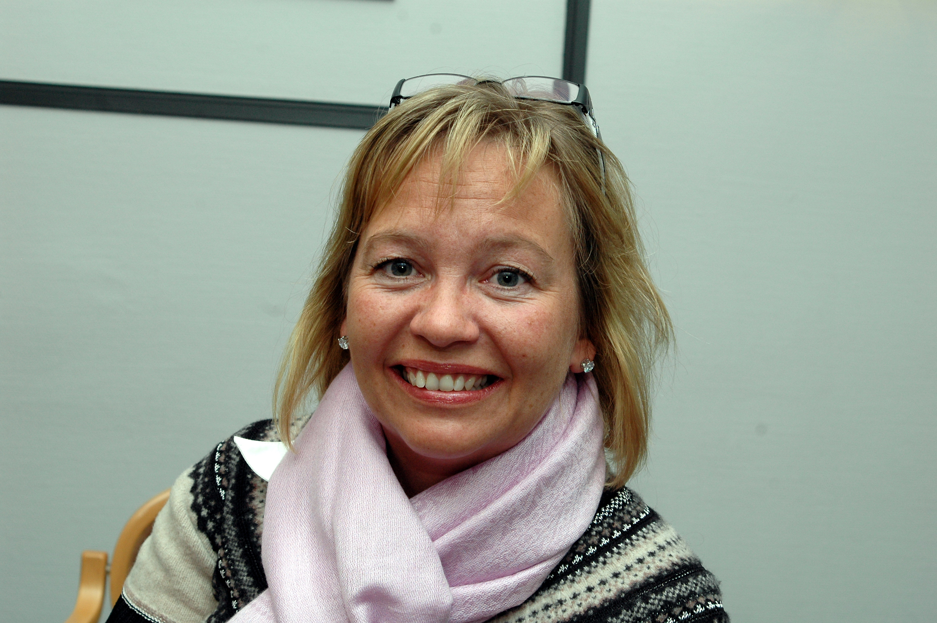 Anita �stby, H�ylandet. Medlem av oppvekstkommisjonen Oppvekstkommisjonen 22. og 23. april 2010